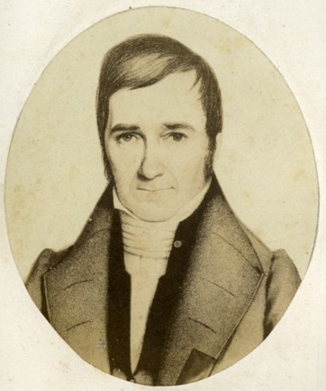 Reproducción fotográfica de un retrato pictórico de medio busto del jurisconsulto y diplomático argentino que se desempenó durante 17 años como ministro del gobierno de Juan Manuel de Rosas.